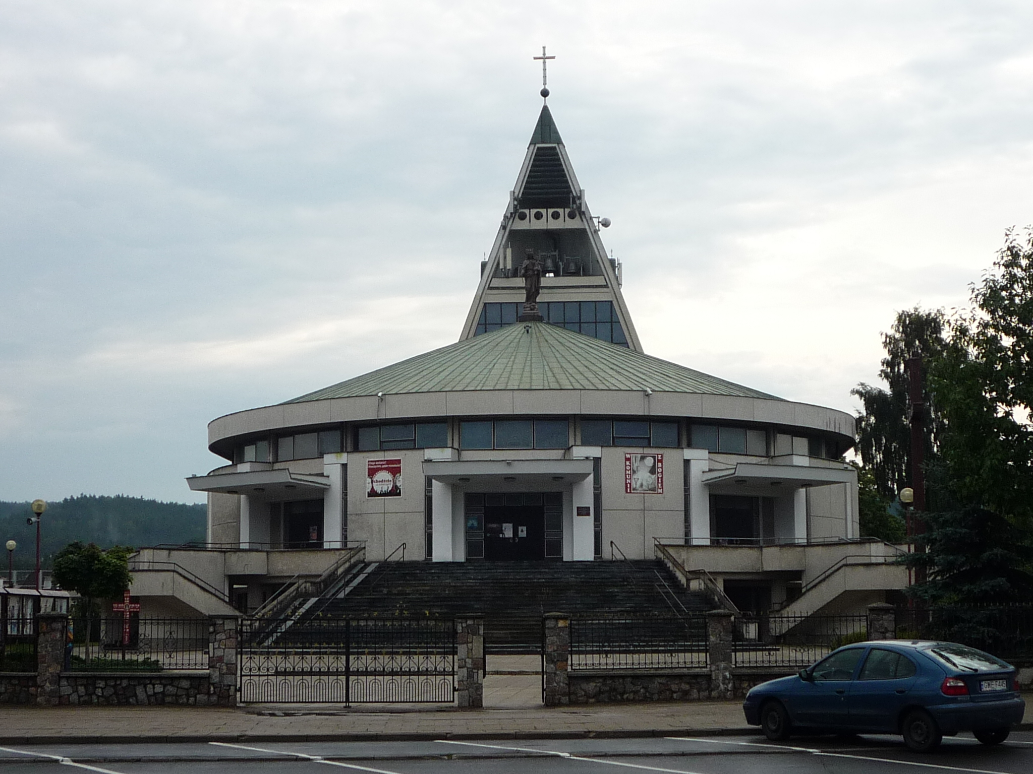 Rumia - rzymskokatolicki kościół parafialny pw. MB Wspomożenia Wiernych.